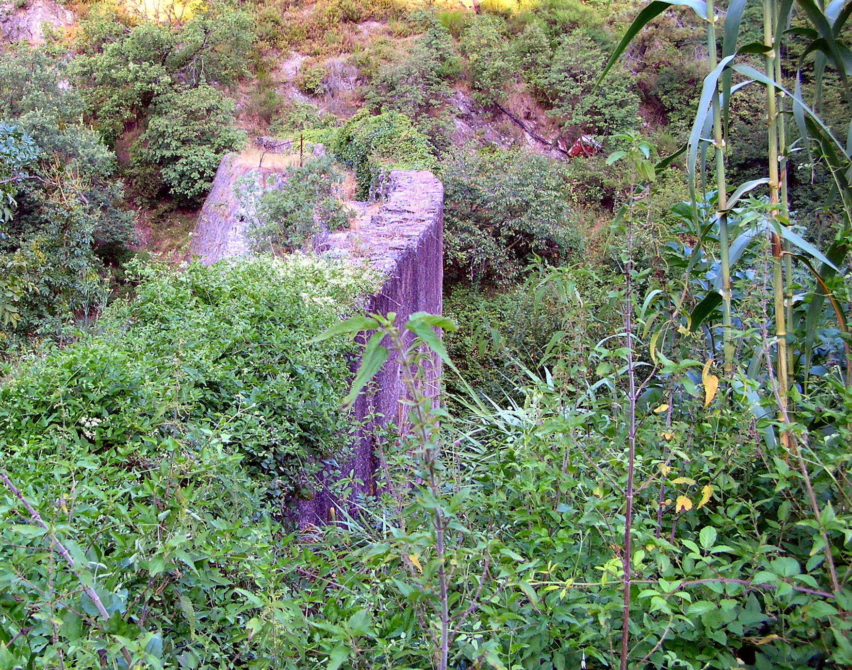 Genova, Borzoli, Diga dell'ex Lago Figoi